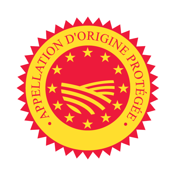 Marque communautaire de l'appellation d'origine "Appellation d'origine protégée" (AOP)